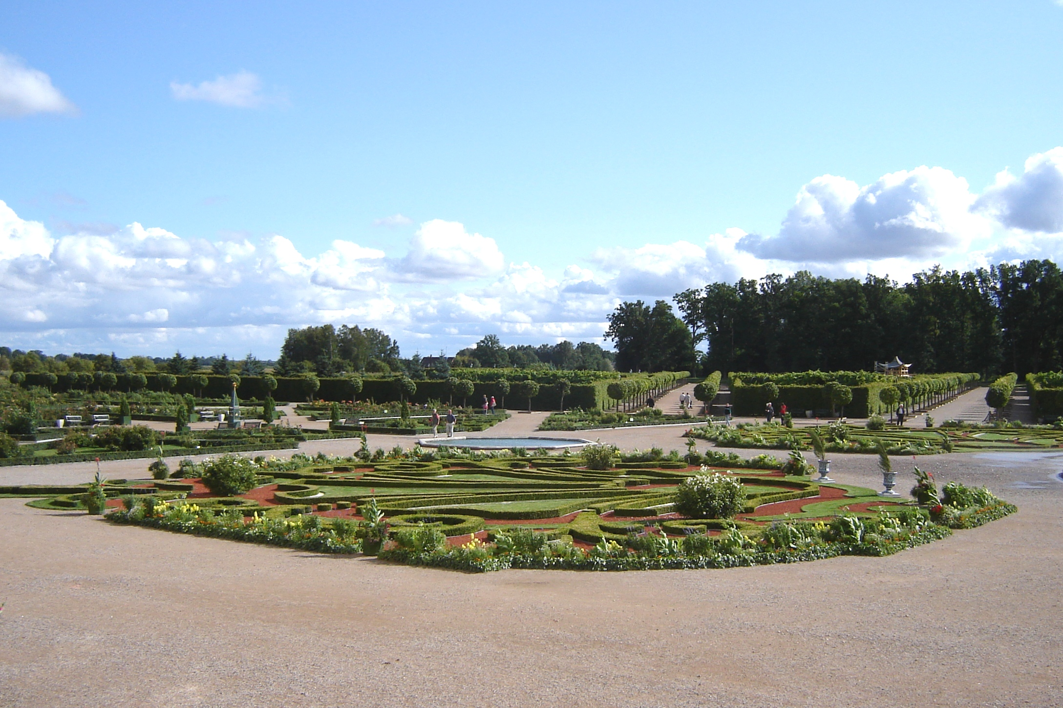 Schloss Rundale, Schlosspark